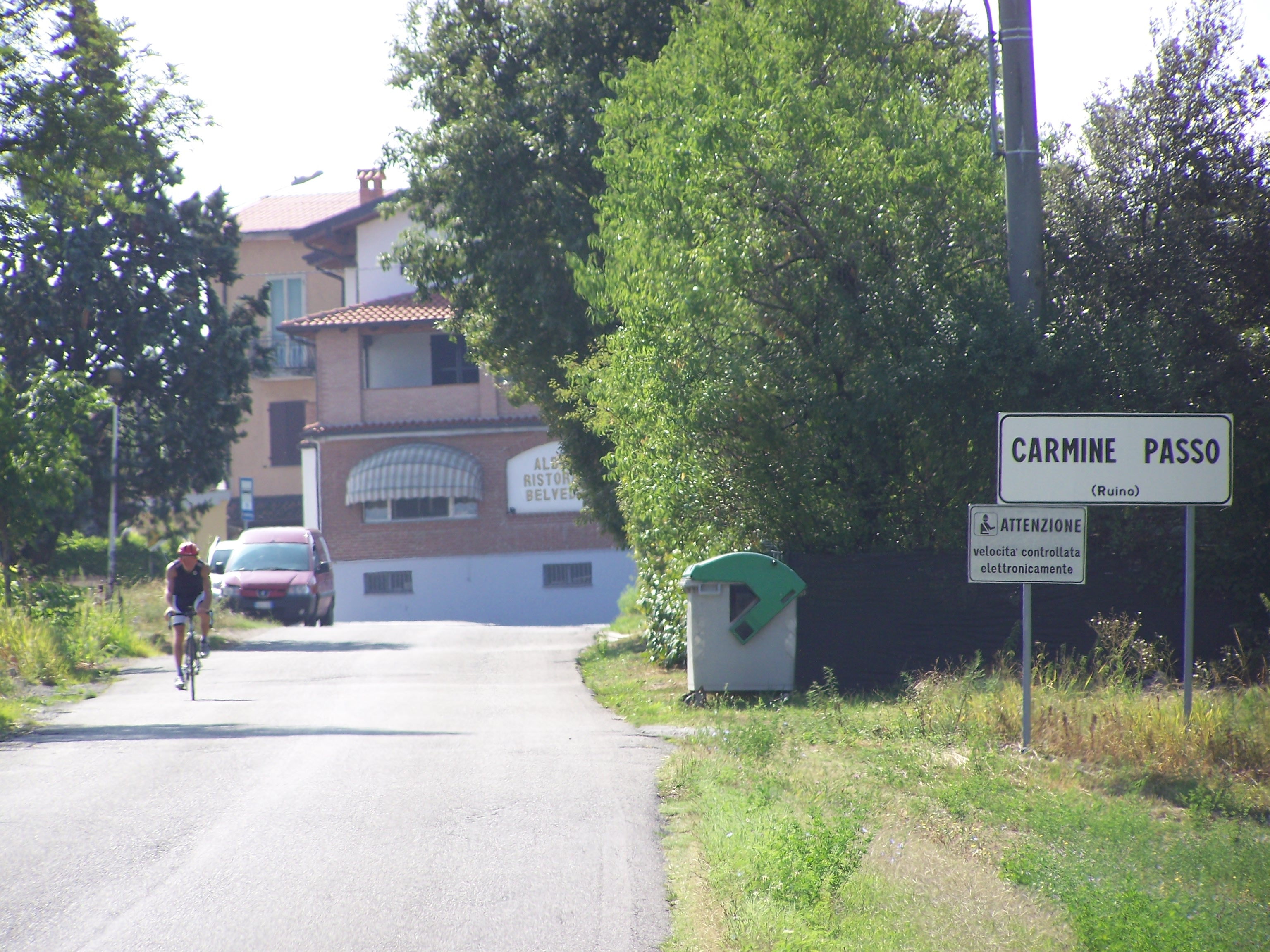 Passo del Carmine